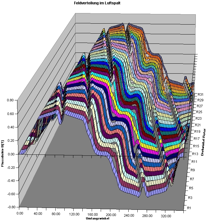 Feldwelle einer 2poligen Synchronmaschine